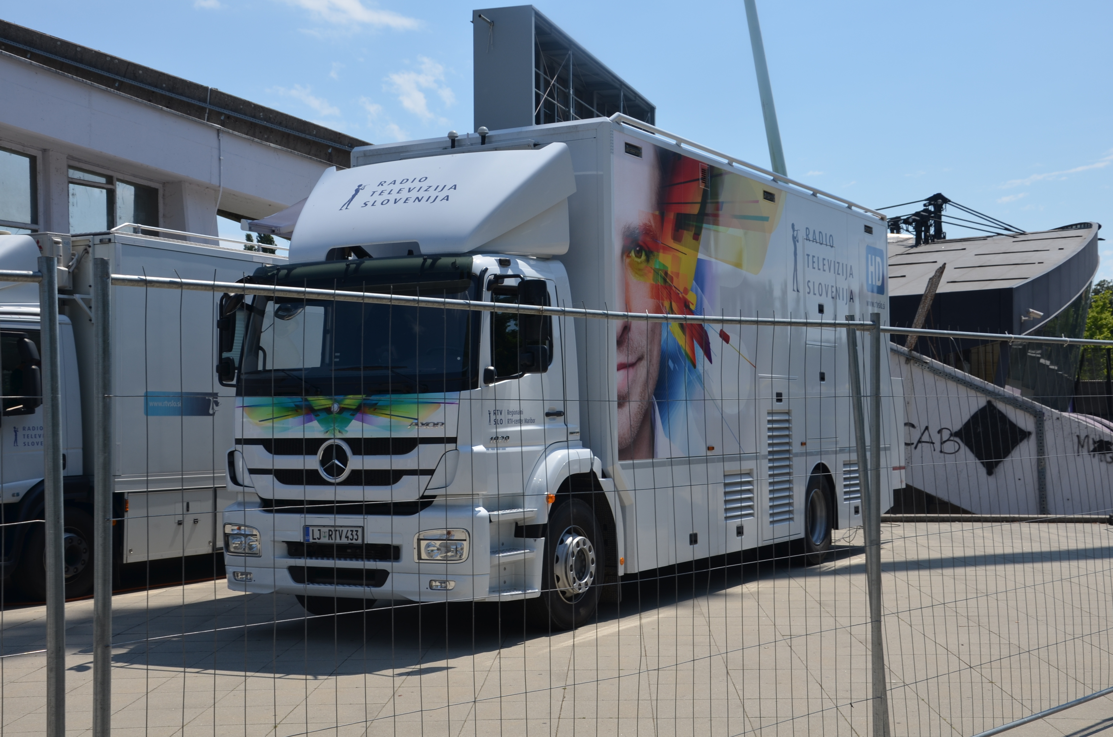 Reportažno vozilo RTV-centra Maribor.